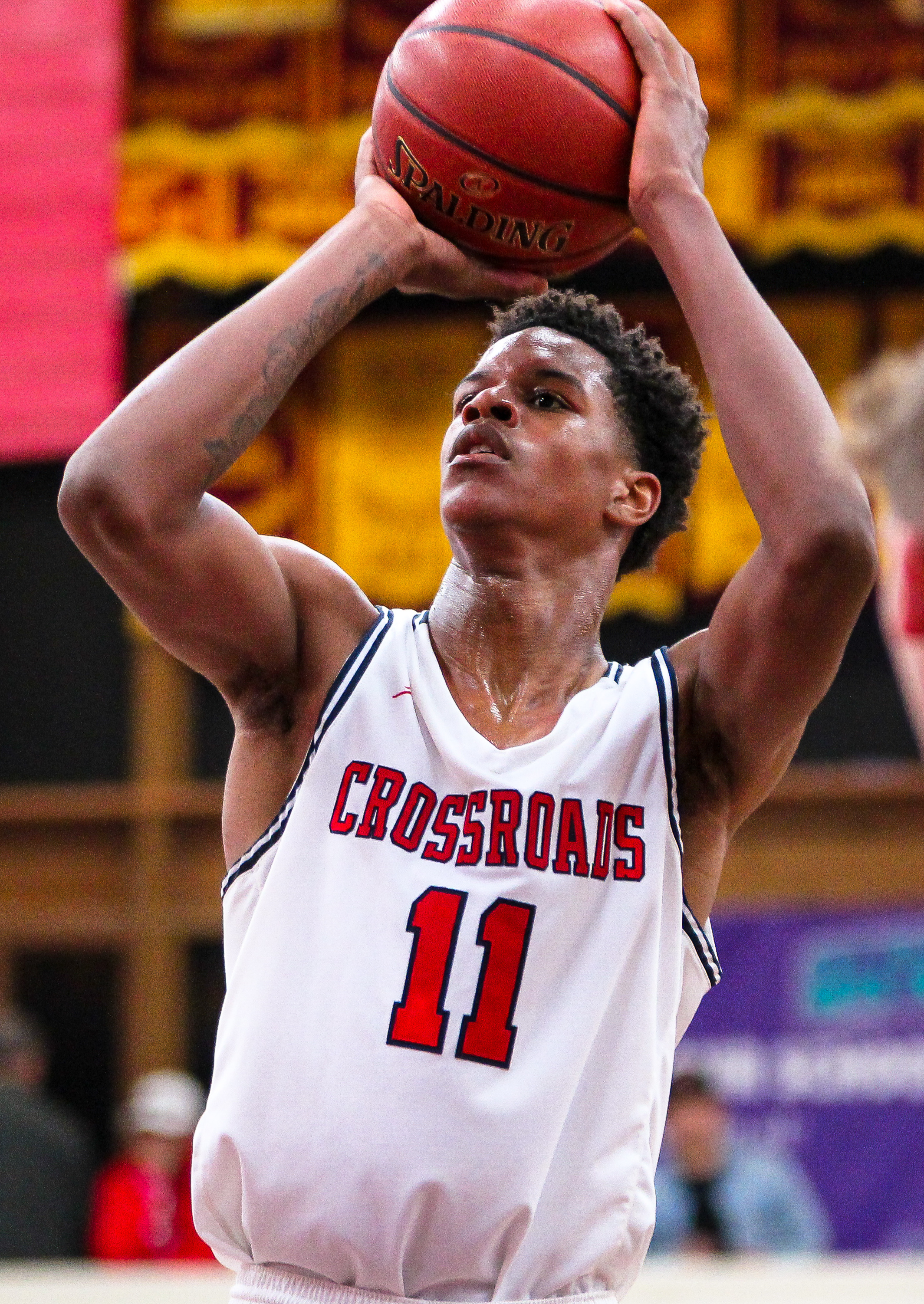 Torrey Pines, San Diego 12-27-17